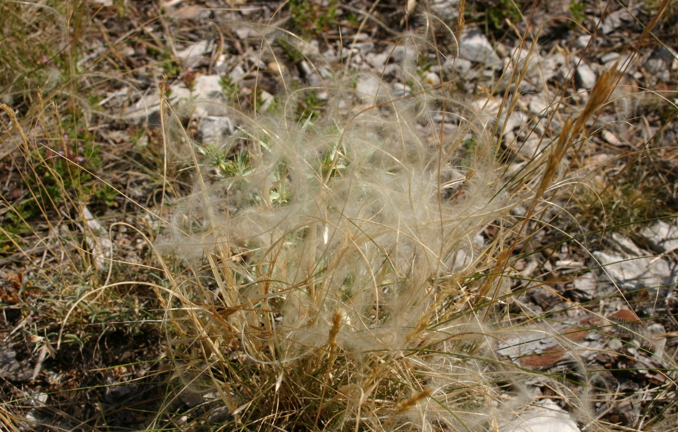 Stipa pennata: Bearing fruits